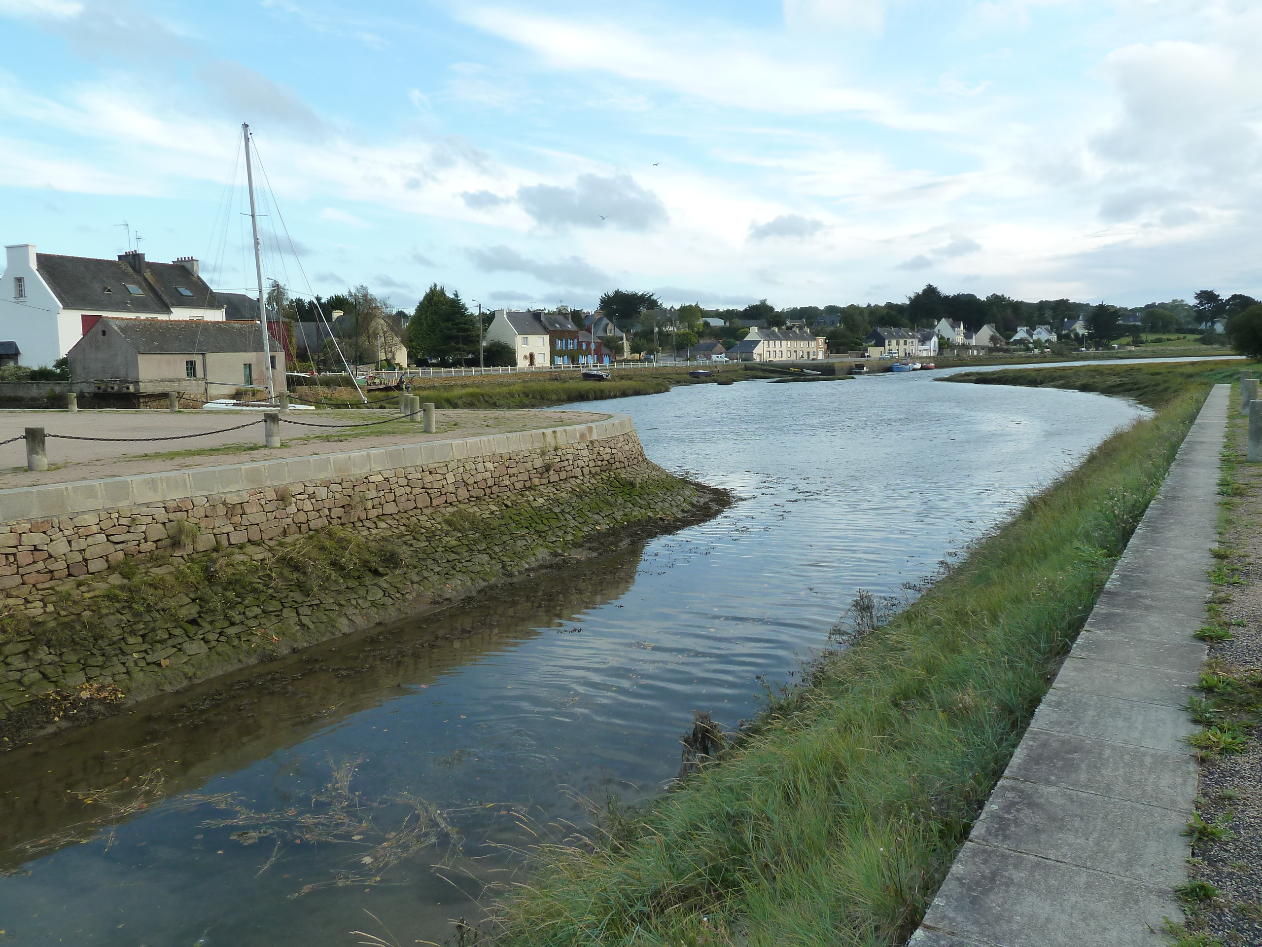 Vue depuis la place Valy à Daoulas